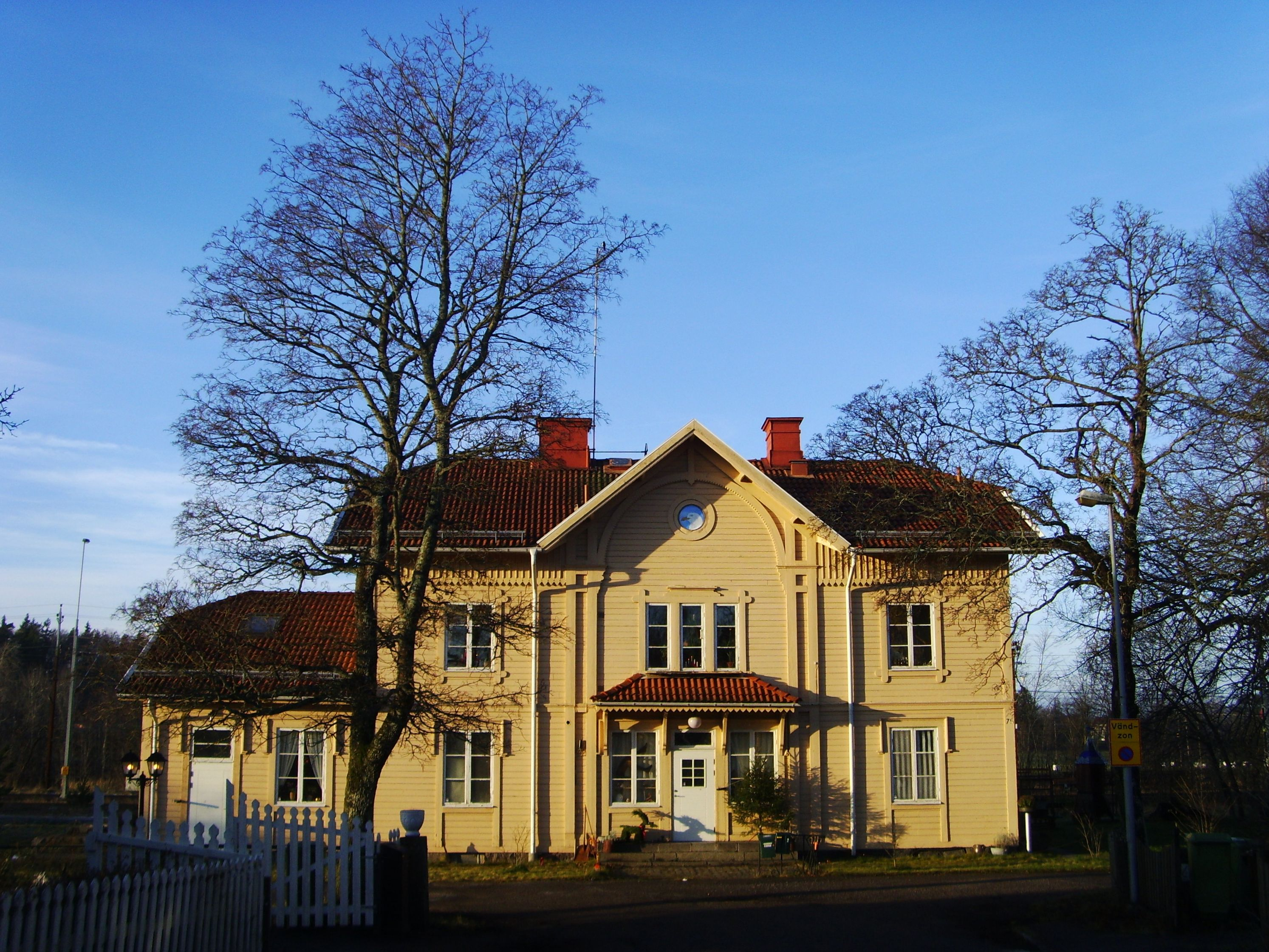 Kimstads stationsmiljö omfattar själva fd stationsbyggnaden och närbelägna bostäder åt personalen (Kimstad är en järnvägsknutpunkt för södra stambanan och linjen mot Skärblacka/Finspång), samt fr o m sensommaren 2009 även en nyöppnad pendeltågsstation.